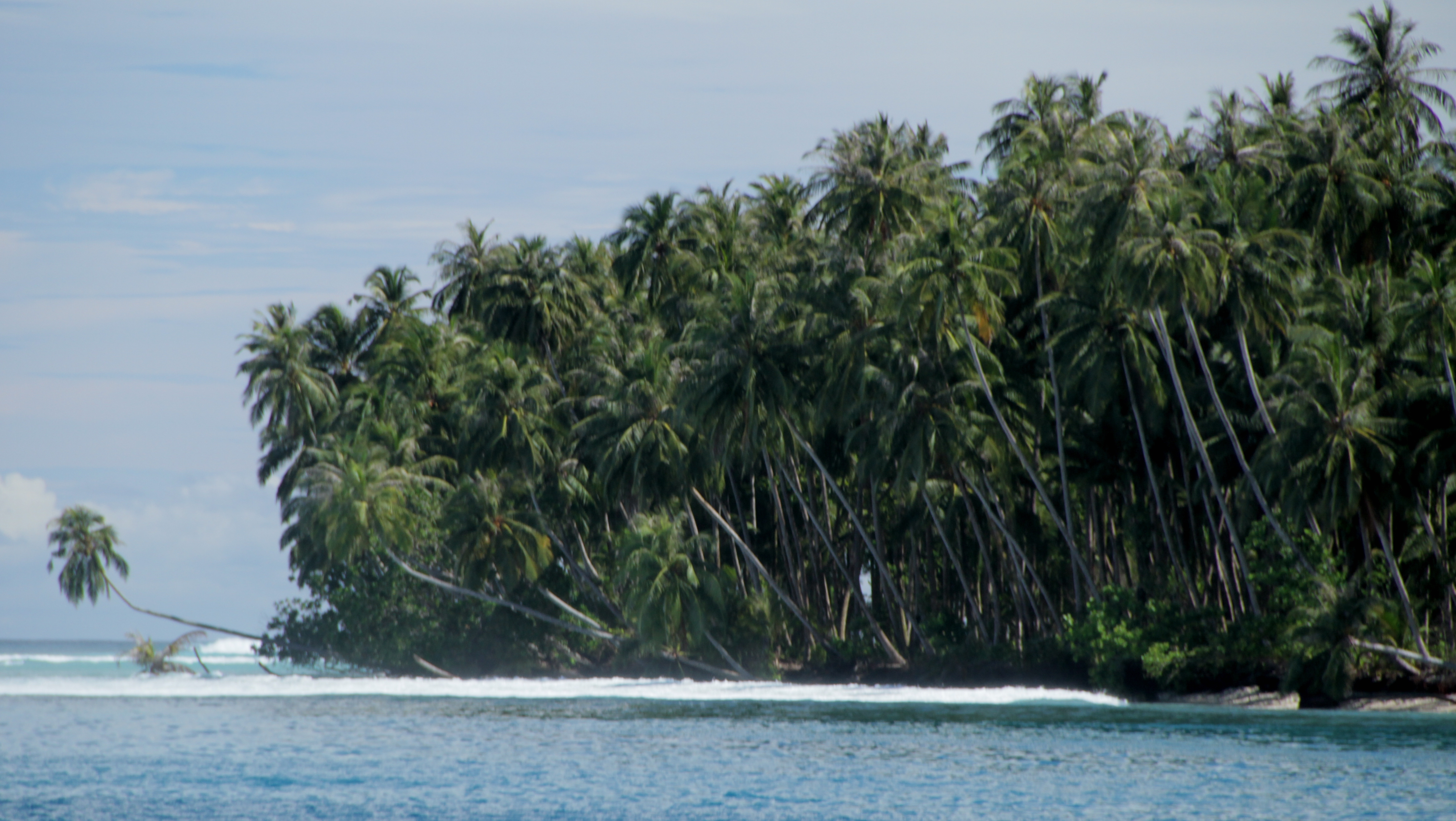 Unnamed Road, Kabupaten Nias Selatan, Sumatra Utara 22881, Indonesia